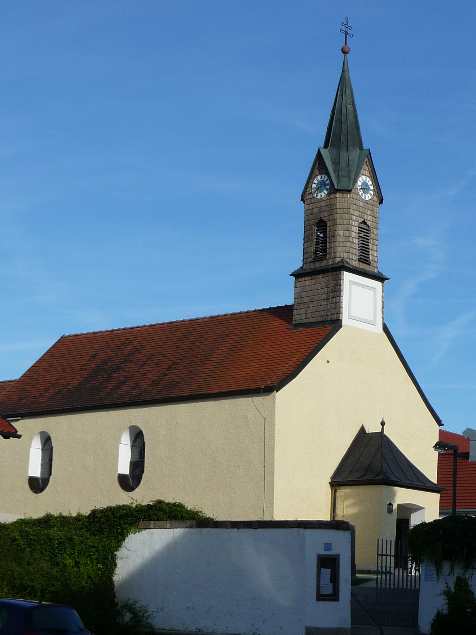 Denkmale in Aholming